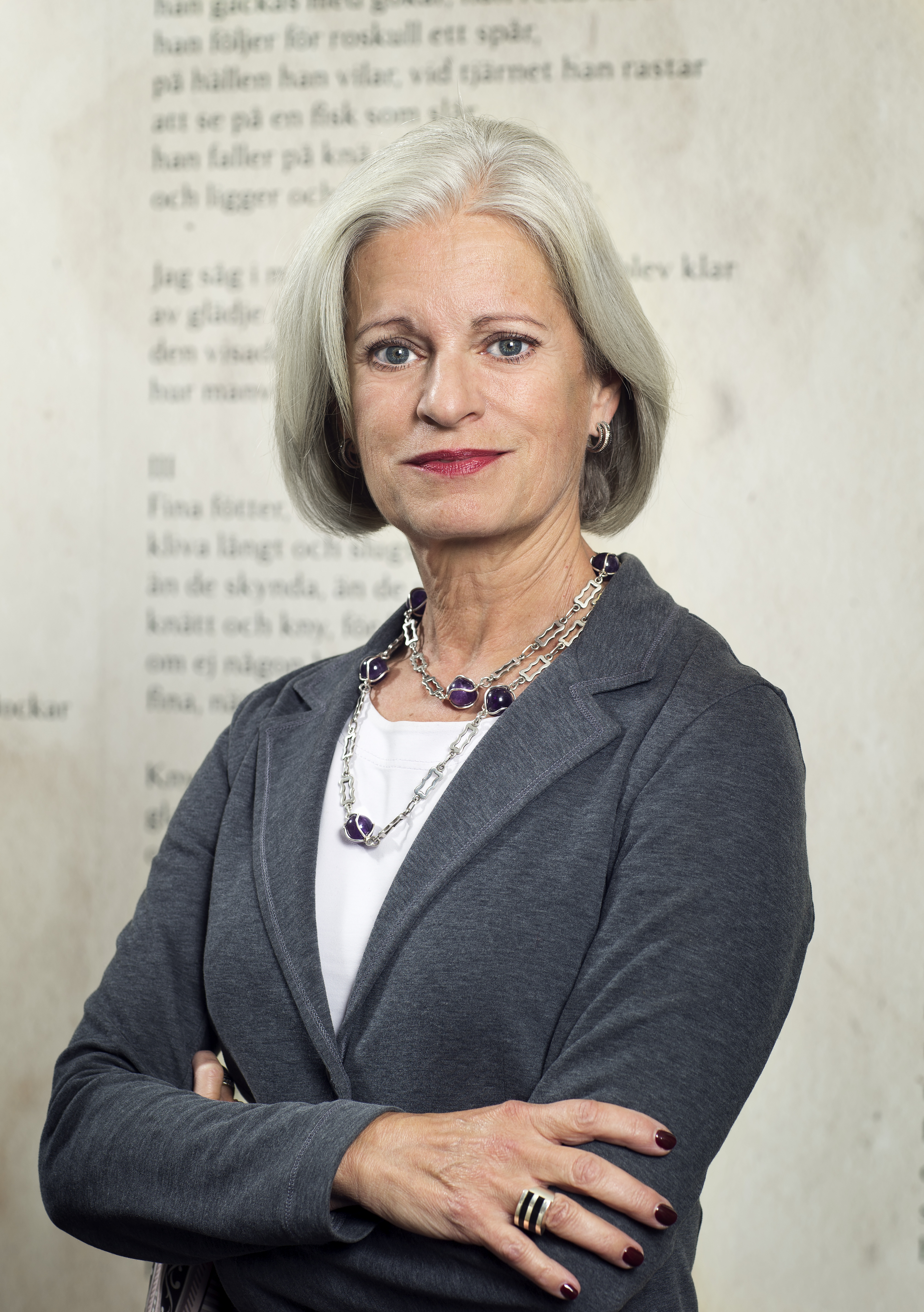 Mediechefen Maria Curman.